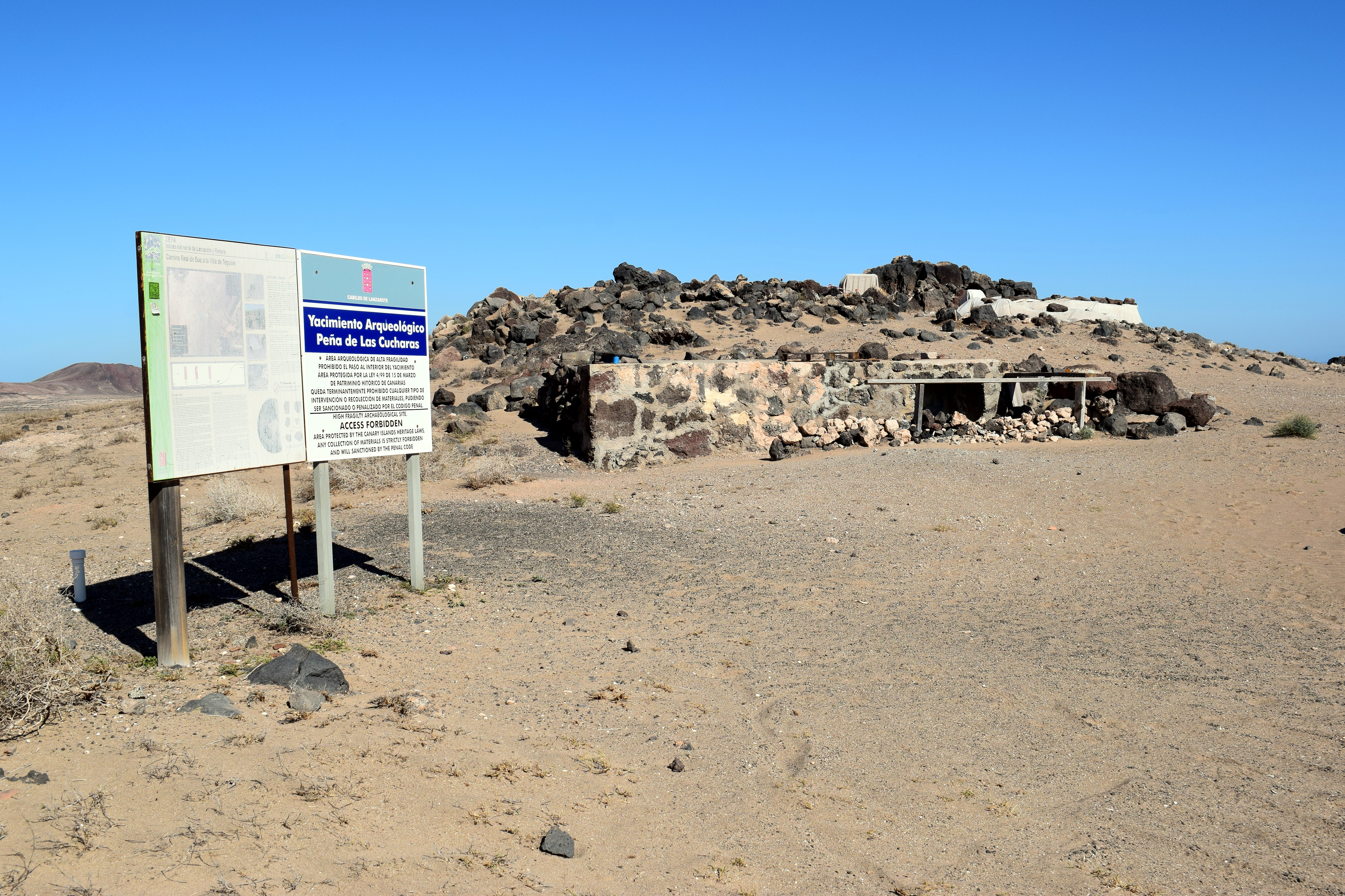 Die archäologische Fundstätte Peña de las Cucharas (Fiquinineo) auf Lanzarote, Kanarische Inseln, Spanien.